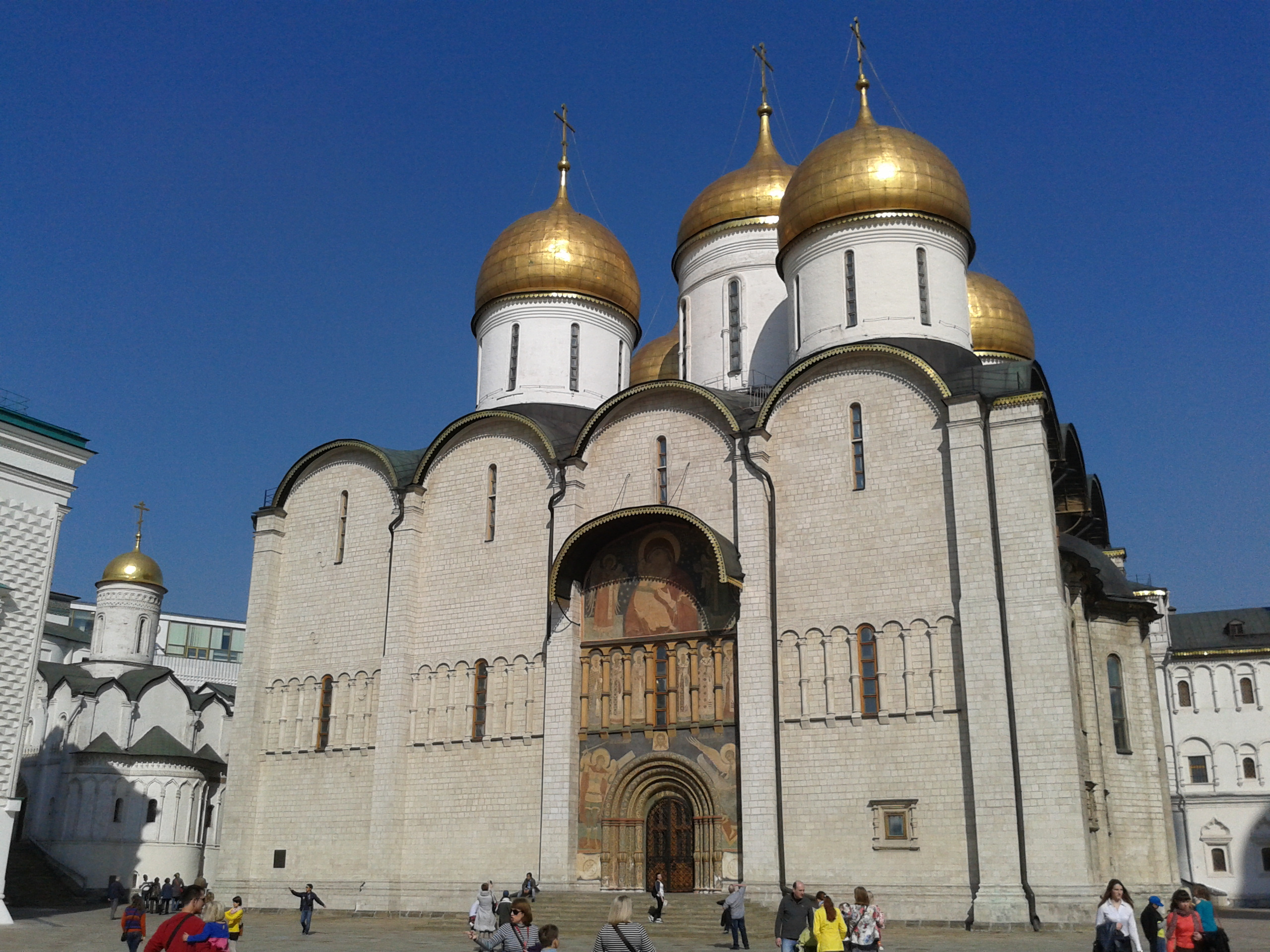 Московский Кремль. Успенский собор